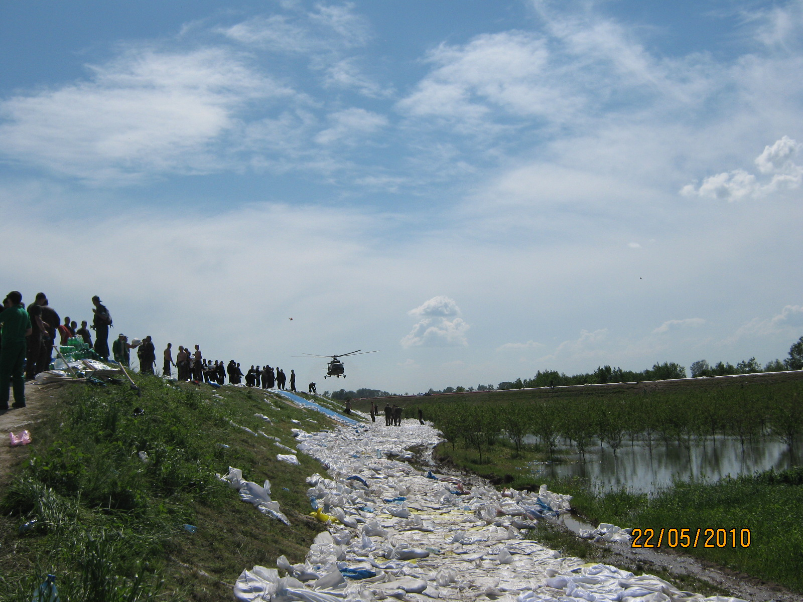 Obrona huty szkła Pilkington w Sandomierzu podczas majowej powodzi 2010.